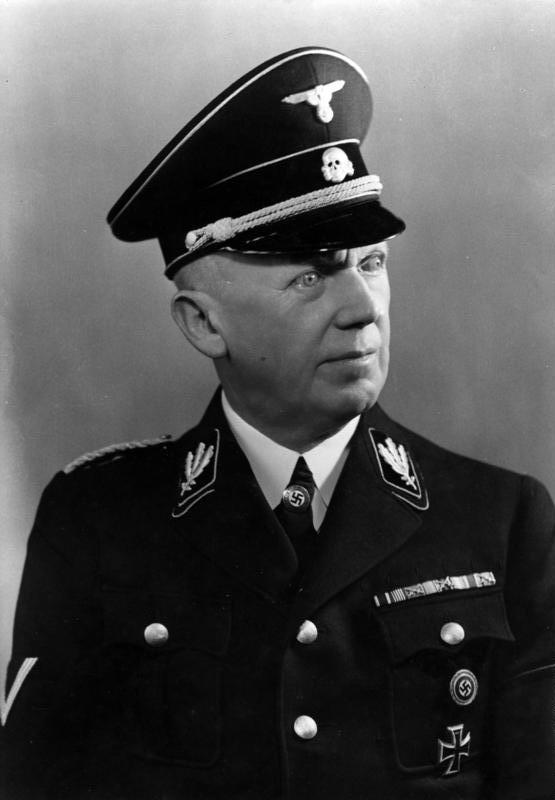 Dr. Lammers, Reichsminister und Chef der Reichskanzlei [1937 bis 1945]